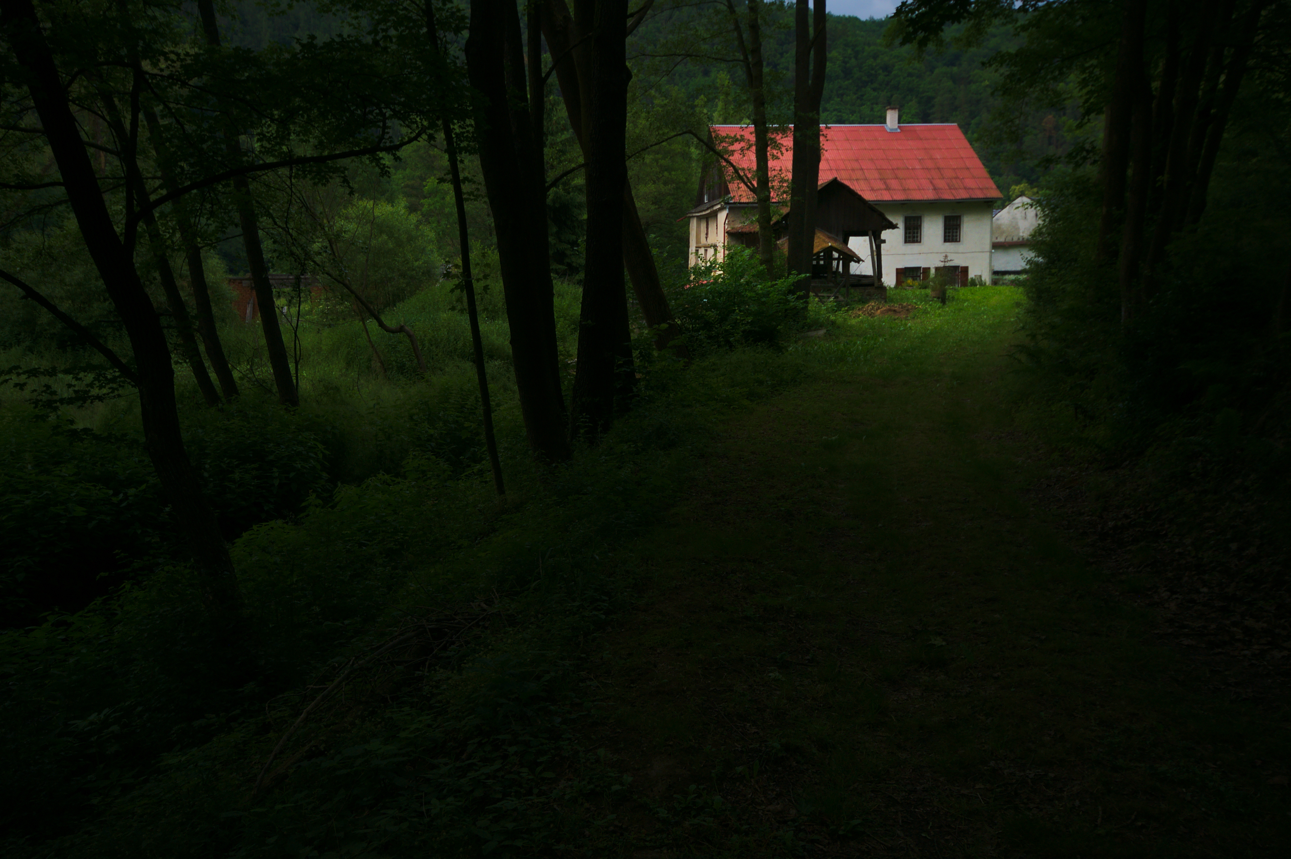 Balatkův mlýn, Kozov, Bouzov, okres Olomouc